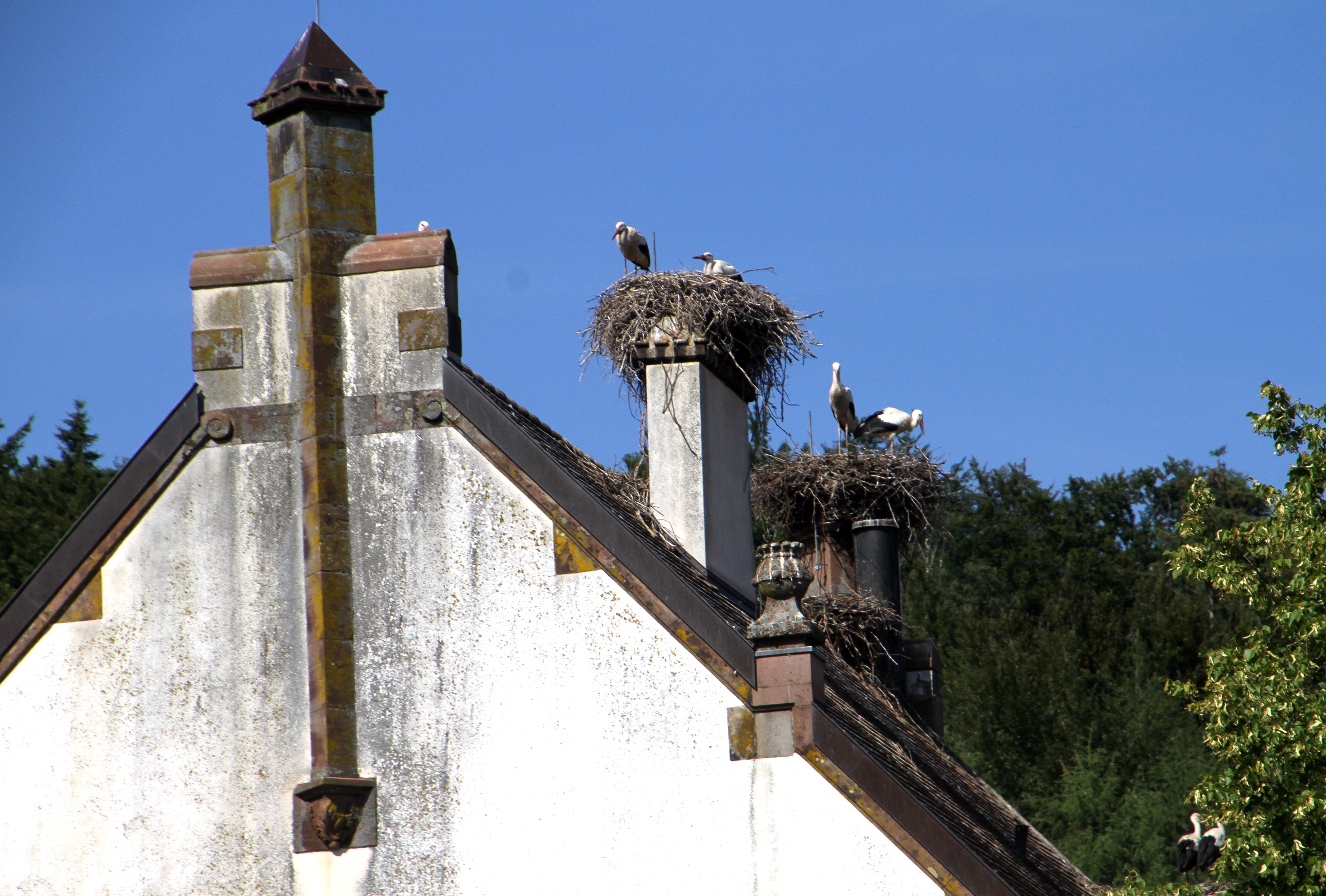 Kirschbacherhof (Dietrichingen)